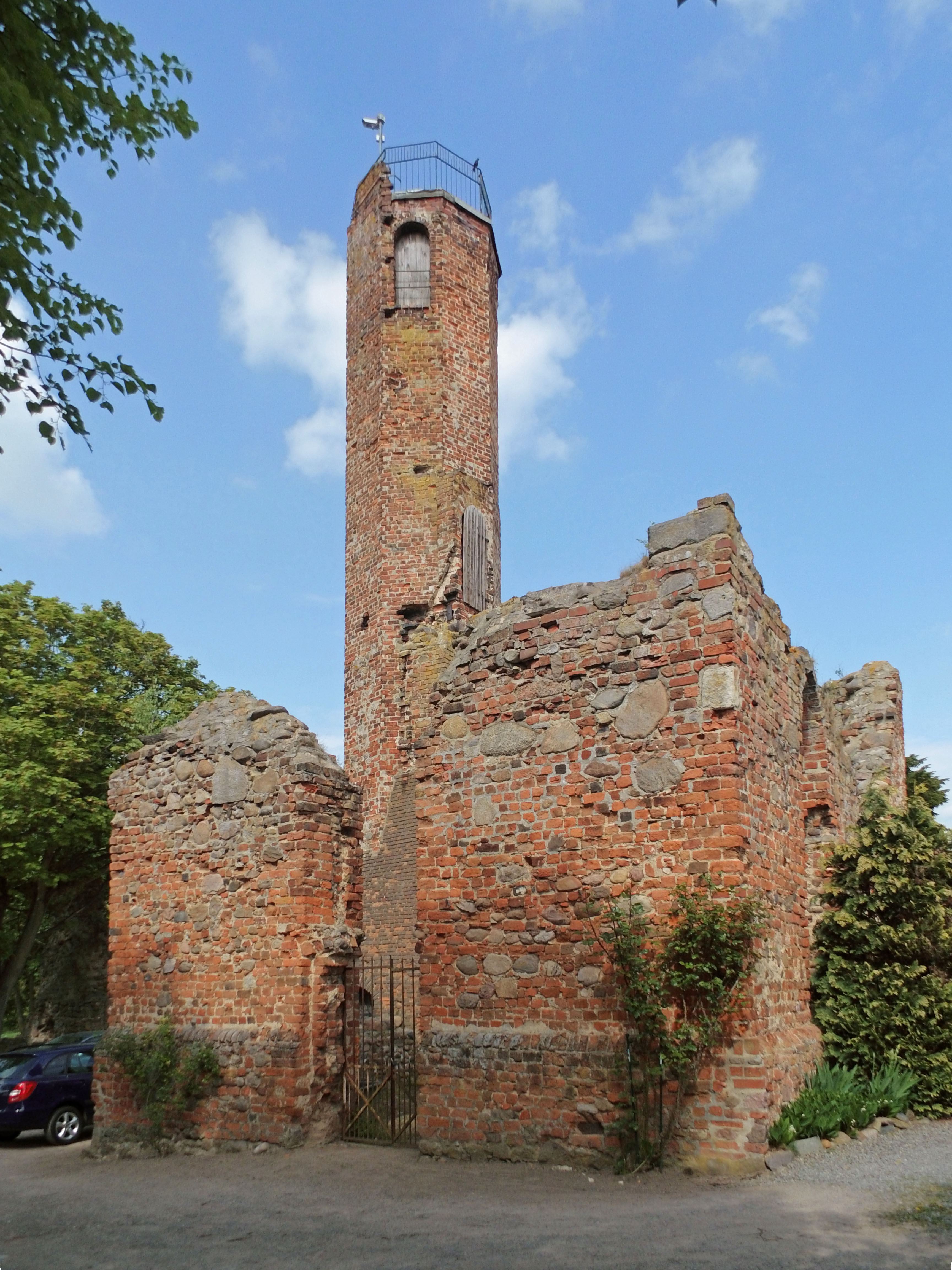 Teilansicht der Burgruine in Kalbe (Milde)